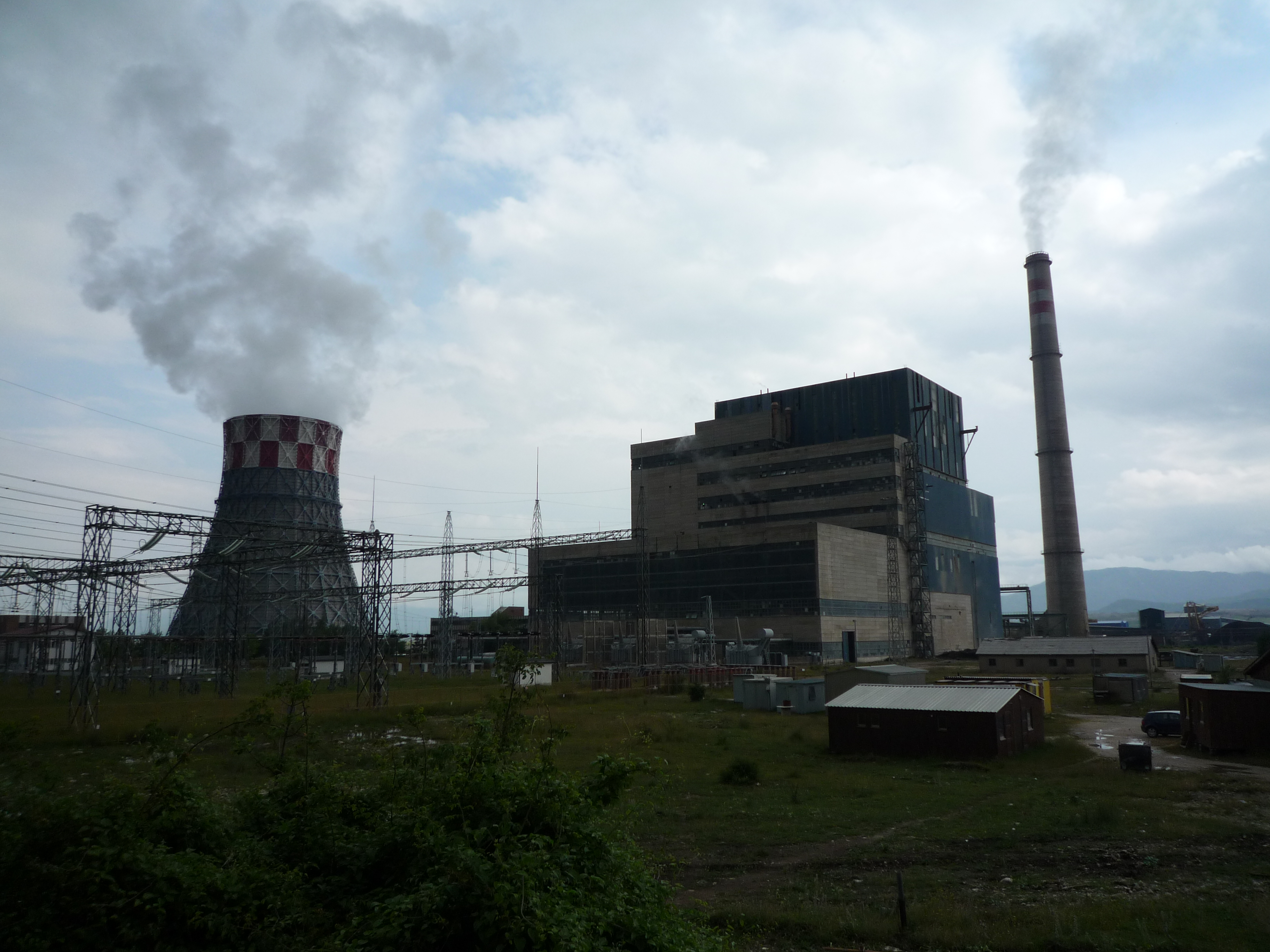 Termoelektrana u Gackom